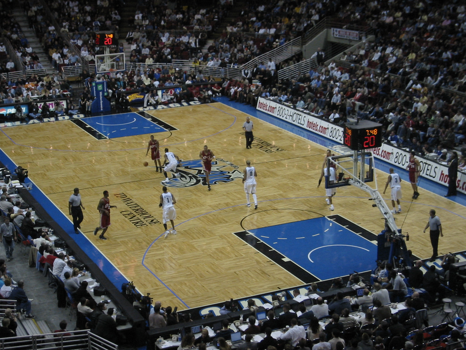 TD Waterhouse Centre de Orlando